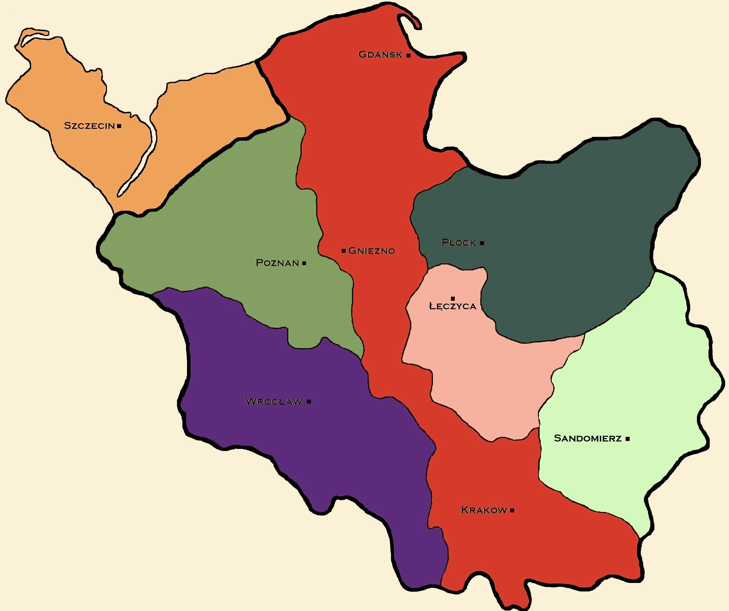 Ustawa sukcesyjna Bolesława Krzywoustego Dzielnica senioralna Lenno Polski pod kontrolą princepsa Ziemia Władysława II Ziemia Bolesława IV Ziemie Mieszka III Ziemie Henryka Oprawa wdowia Salomei